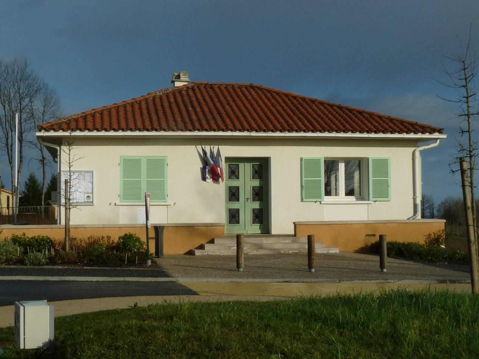 mairie de Mazerolles, Charente, France